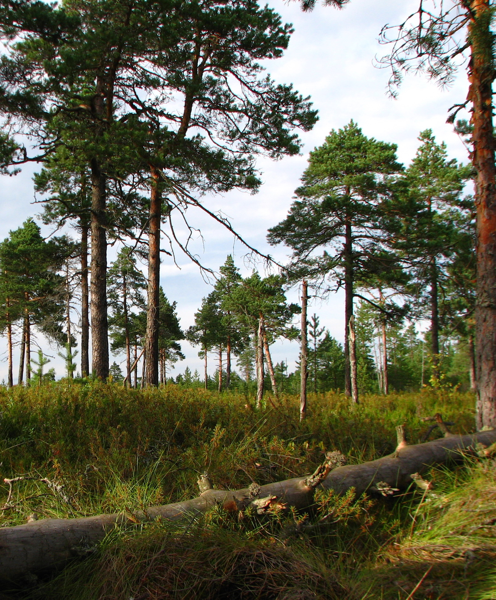 Участок болота с сосной и багульником недалеко от озера Вялье